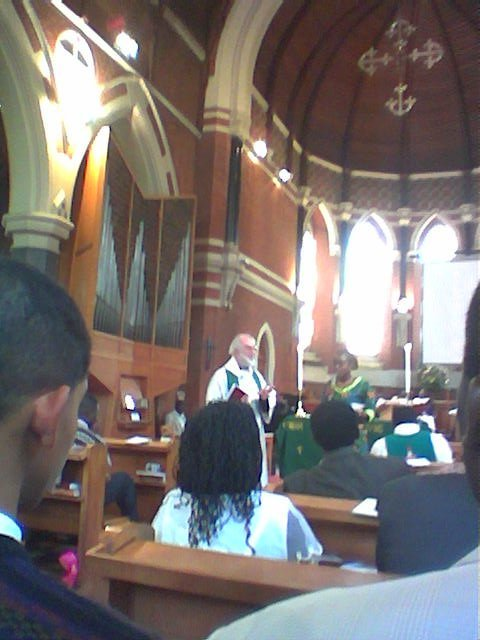 Rowan Williams, archevêque de Cantorbéry, prêchant à l'eucharistie à Ixelles.